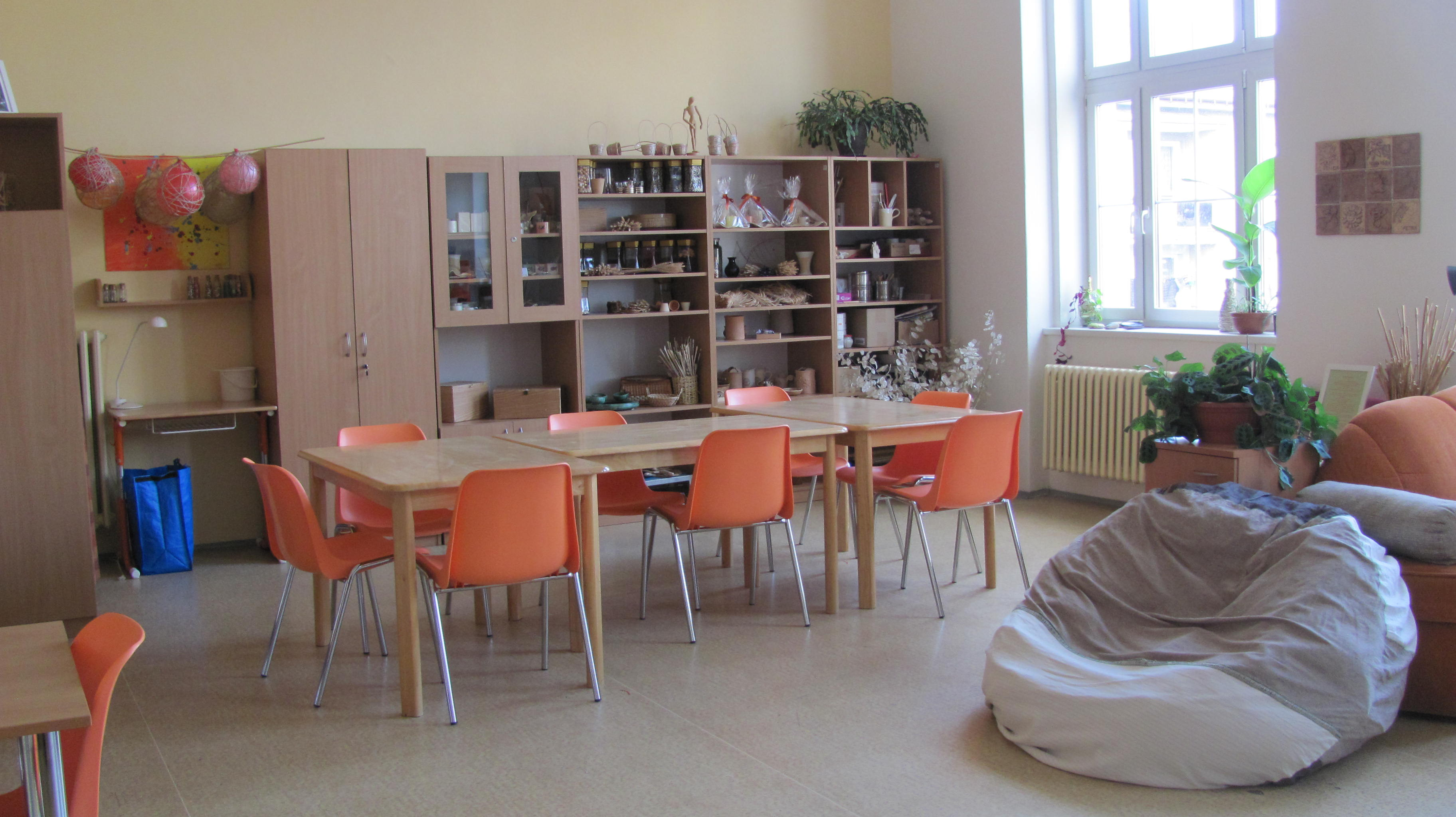 Aktivizační dílna